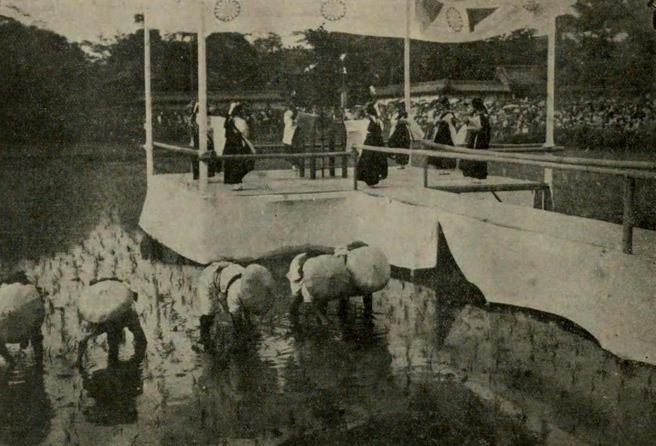 住吉神社御田植神事。